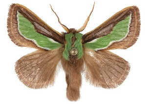 Parasa pygmy